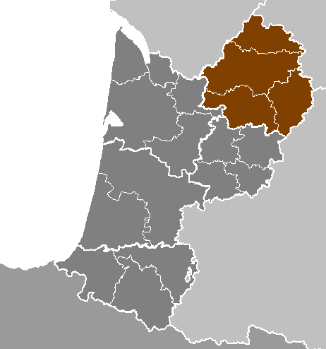 Maps of arrondissements and cantons of France: Département de la Dordogne.PNG (Région Aquitaine)